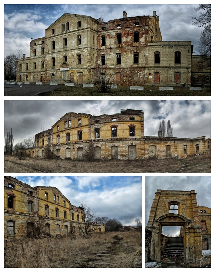 Železniční stanice, nám. Legií 309/5, Duchcov